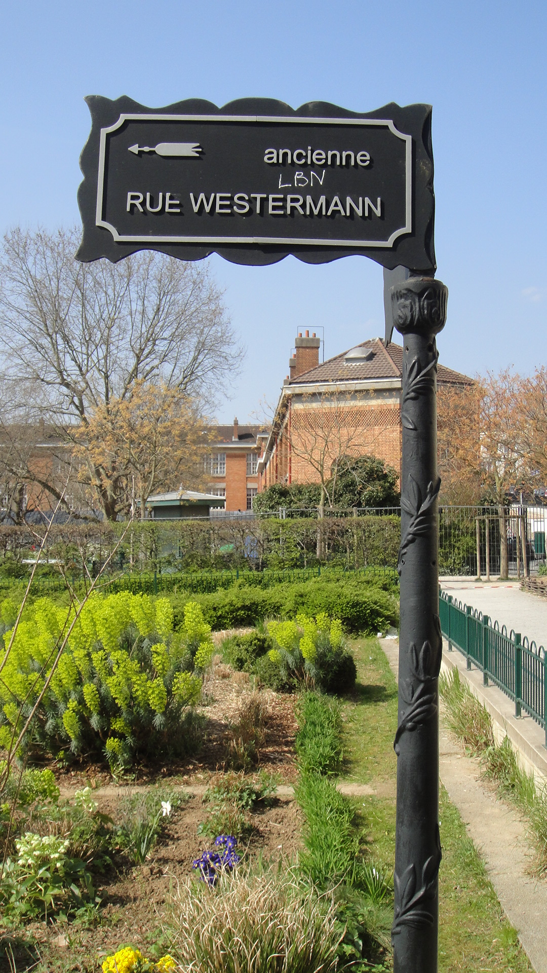 Un panneau de l'ancienne rue Westermann dans le square du Docteur-Grancher.